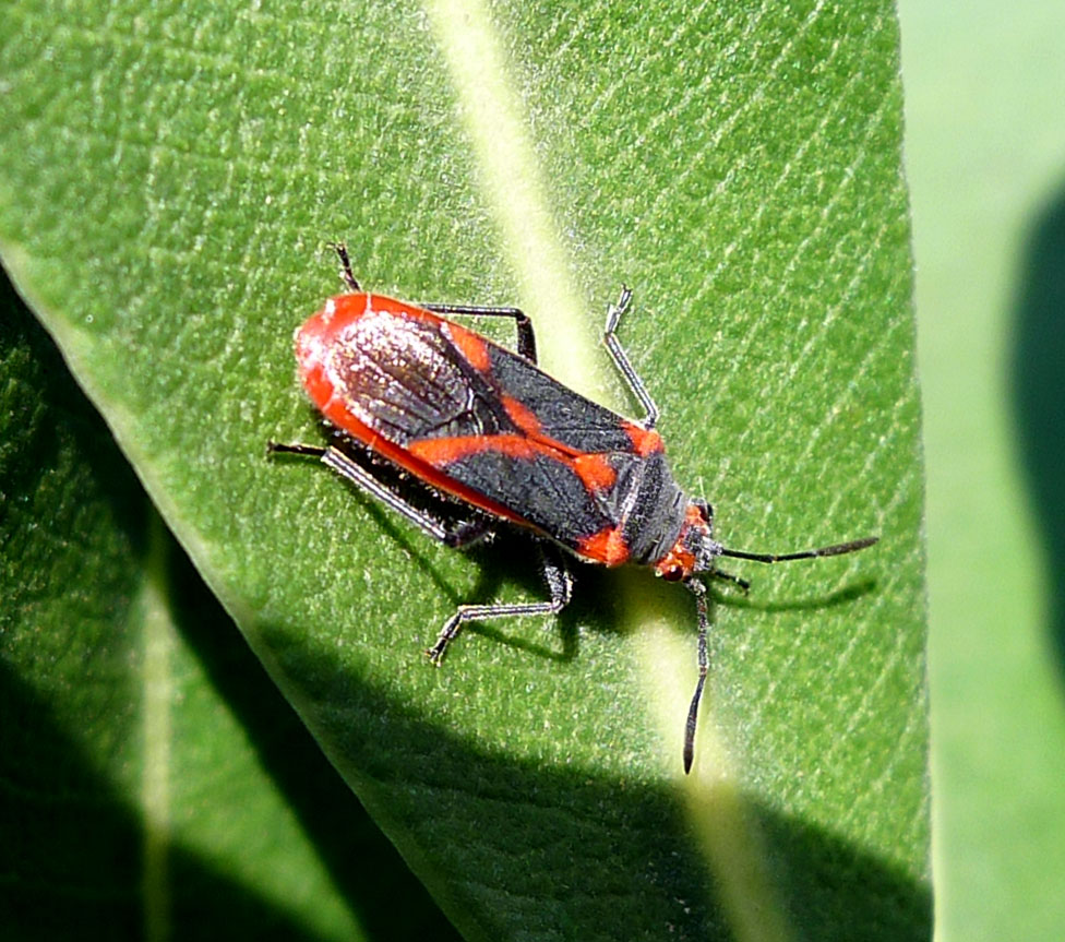 Caenocoris nerii. Hemiptera. Lygaeidae